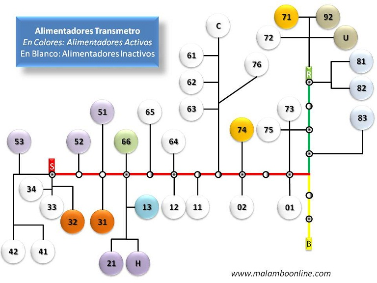 Listado de rutas alimentadoras de Transmetro Barranquilla, que se encuentran en operación en el momento